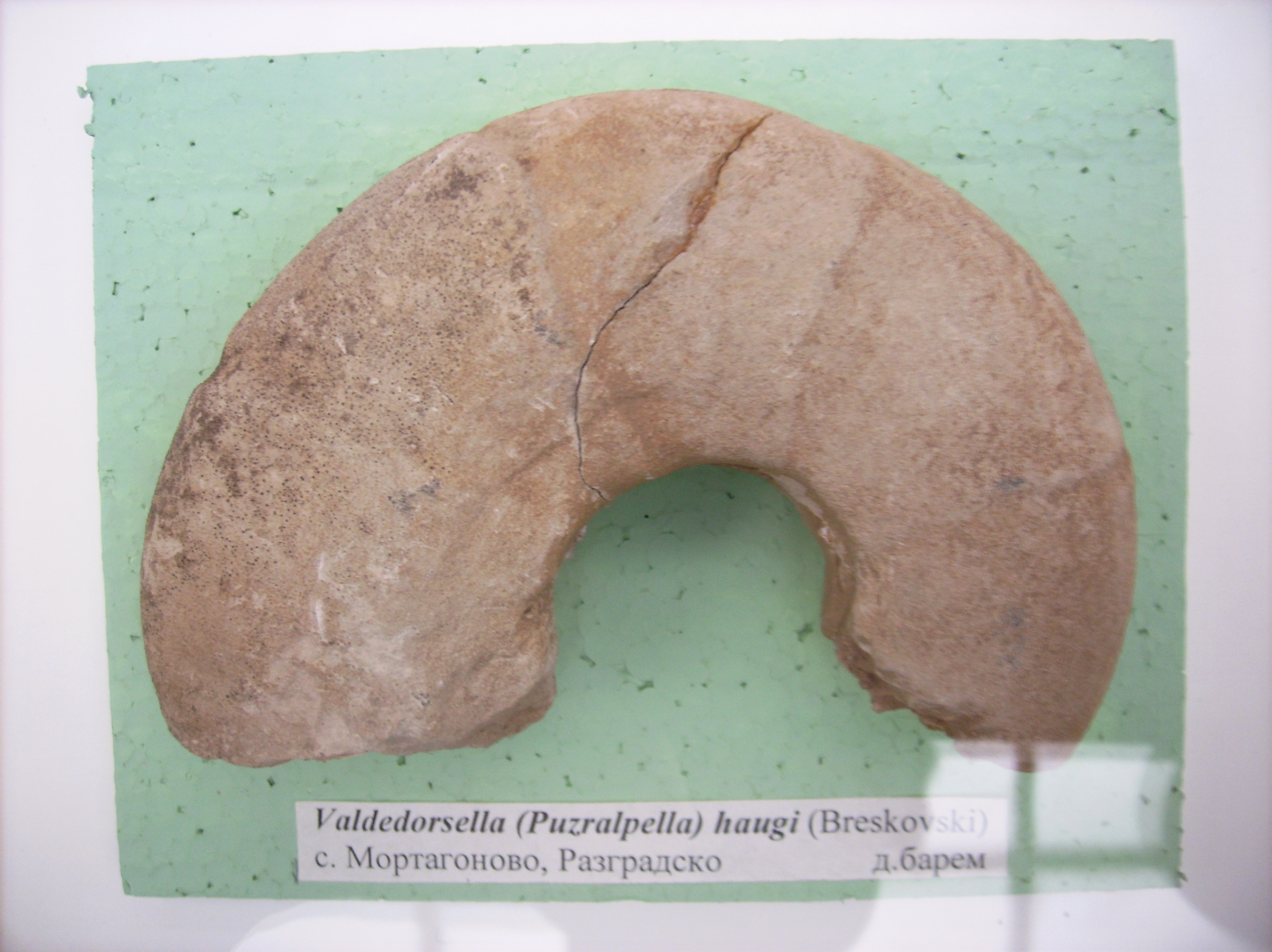 Valdedorsella haugi (Breskovski)